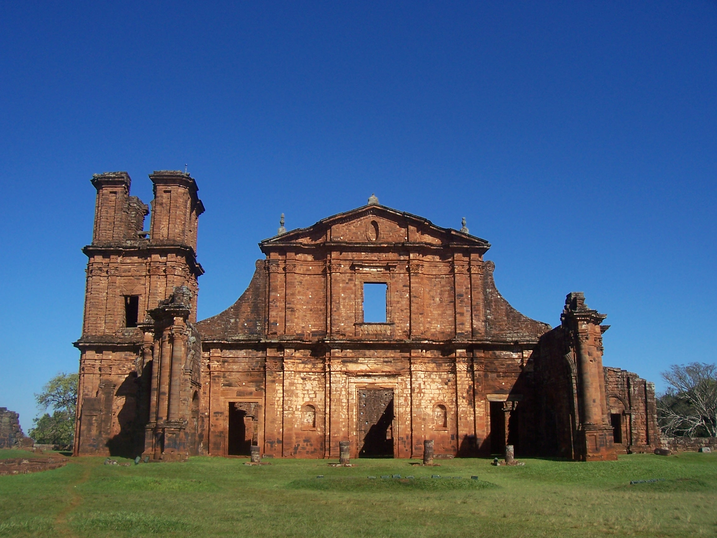 Ruinas jesuíticas de San Miguel Arcángel en la ciudad de São Miguel das Missões, en Rio Grande do Sul, Brasil. San Miguel Arcángel ruins, in São Miguel das Missões city, Rio Grande do Sul, Brazil; O sitio arqueológico de São Miguel Arcanjo, na cidade de São Miguel das Missões, RS, Brasil.